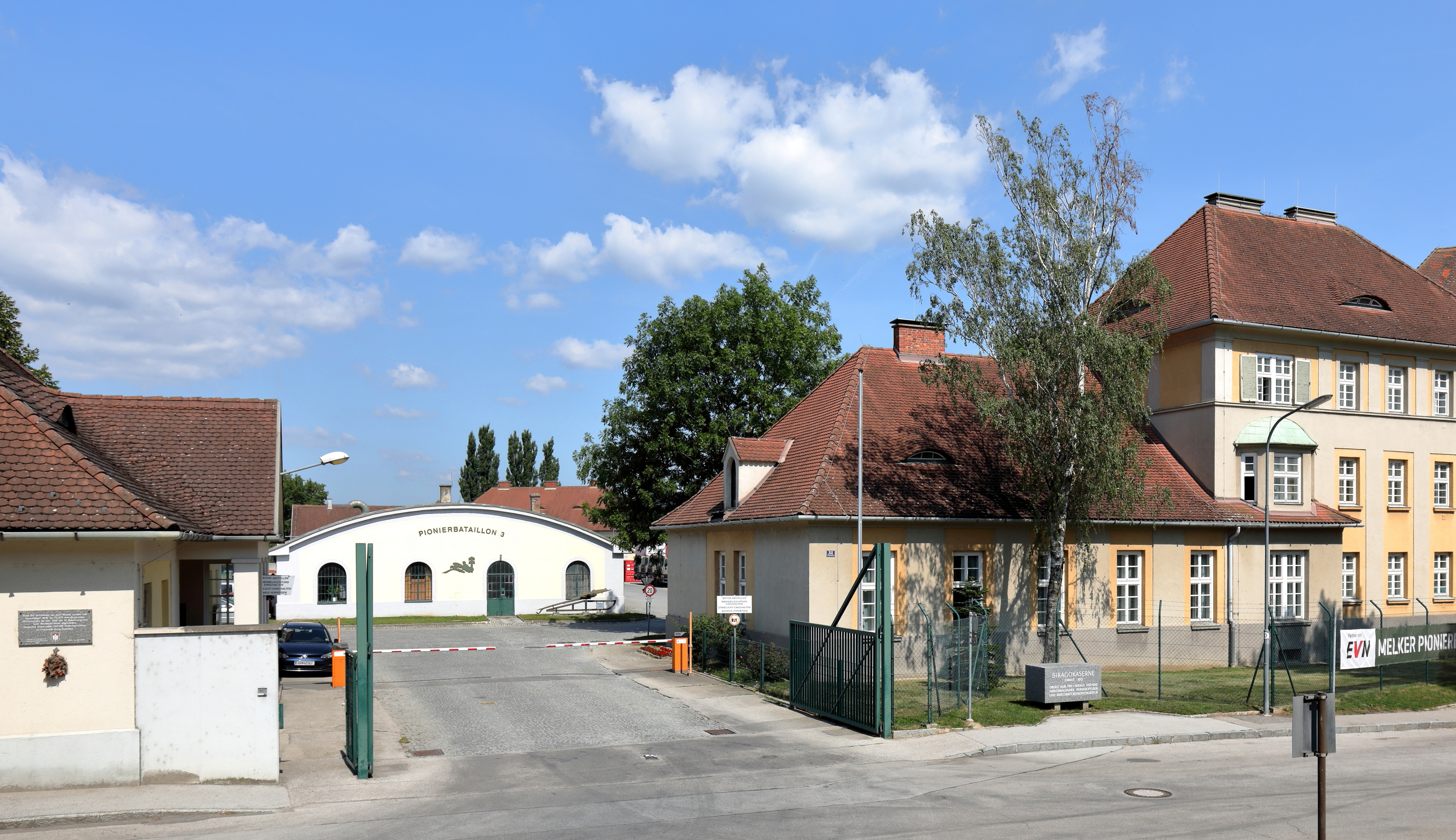 Einfahrtsbereich der Birago-Kaserne in der niederösterreichischen Stadtgemeinde Melk. Die nach dem Militärtechniker Karl von Birago benannte Kaserne wurde von 1912 bis 1913 nach Plänen der Architekten Siegfried Theiss und Hans Jaksch errichtet.